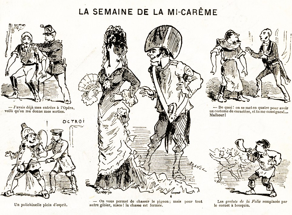 Scènes de la Mi-Carême parisienne.